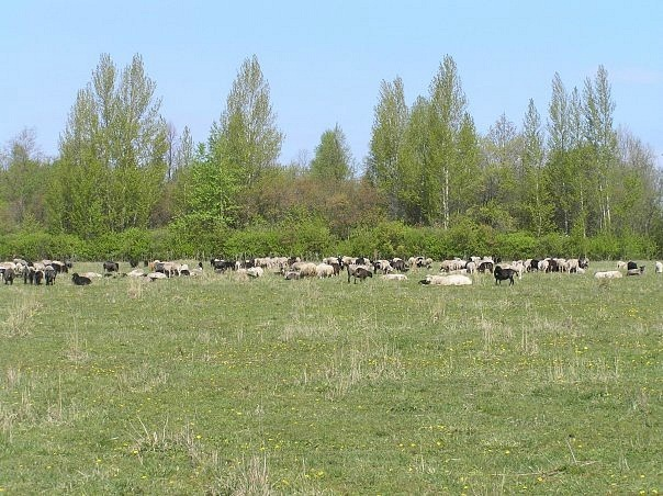 Стадо Тойси-Паразуси